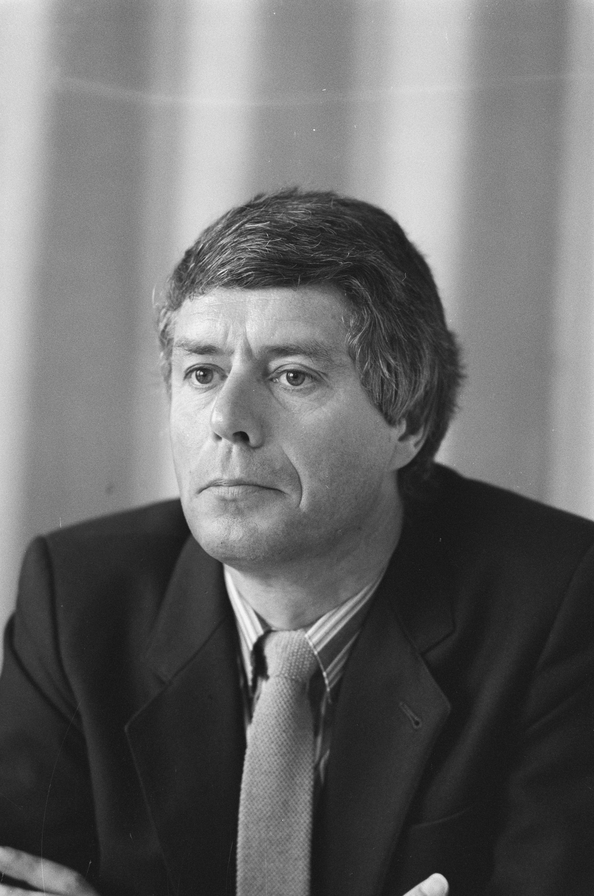 Collectie / Archief : Fotocollectie Anefo Reportage / Serie : [ onbekend ] Beschrijving : Politiewoordvoerder Klaas Wilting Datum : 21 april 1988 Trefwoorden : politie, portretten Persoonsnaam : Wilting, Klaas Fotograaf : Bogaerts, Rob / Anefo Auteursrechthebbende : Nationaal Archief Materiaalsoort : Negatief (zwart/wit) Nummer archiefinventaris : bekijk toegang 2.24.01.05 Bestanddeelnummer : 934-2336